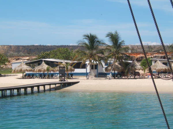 Isla de Cubagua, Nueva Esparta Venezuela